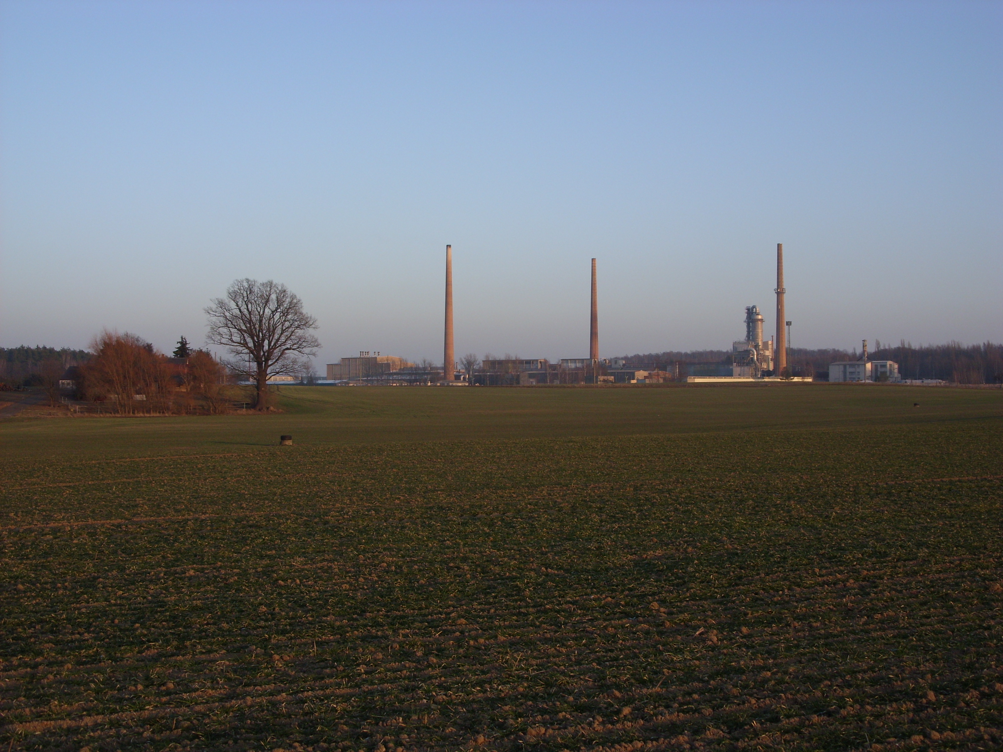 Blick zu den Feuerfestwerken Wetro in der Gemeinde Puschwitz (sorbisch Bóšicy, Landkreis Bautzen). Hornjoserbsce: Wid do Wětrowa, Gmejna Bóšicy, wokrjes Budyšin.